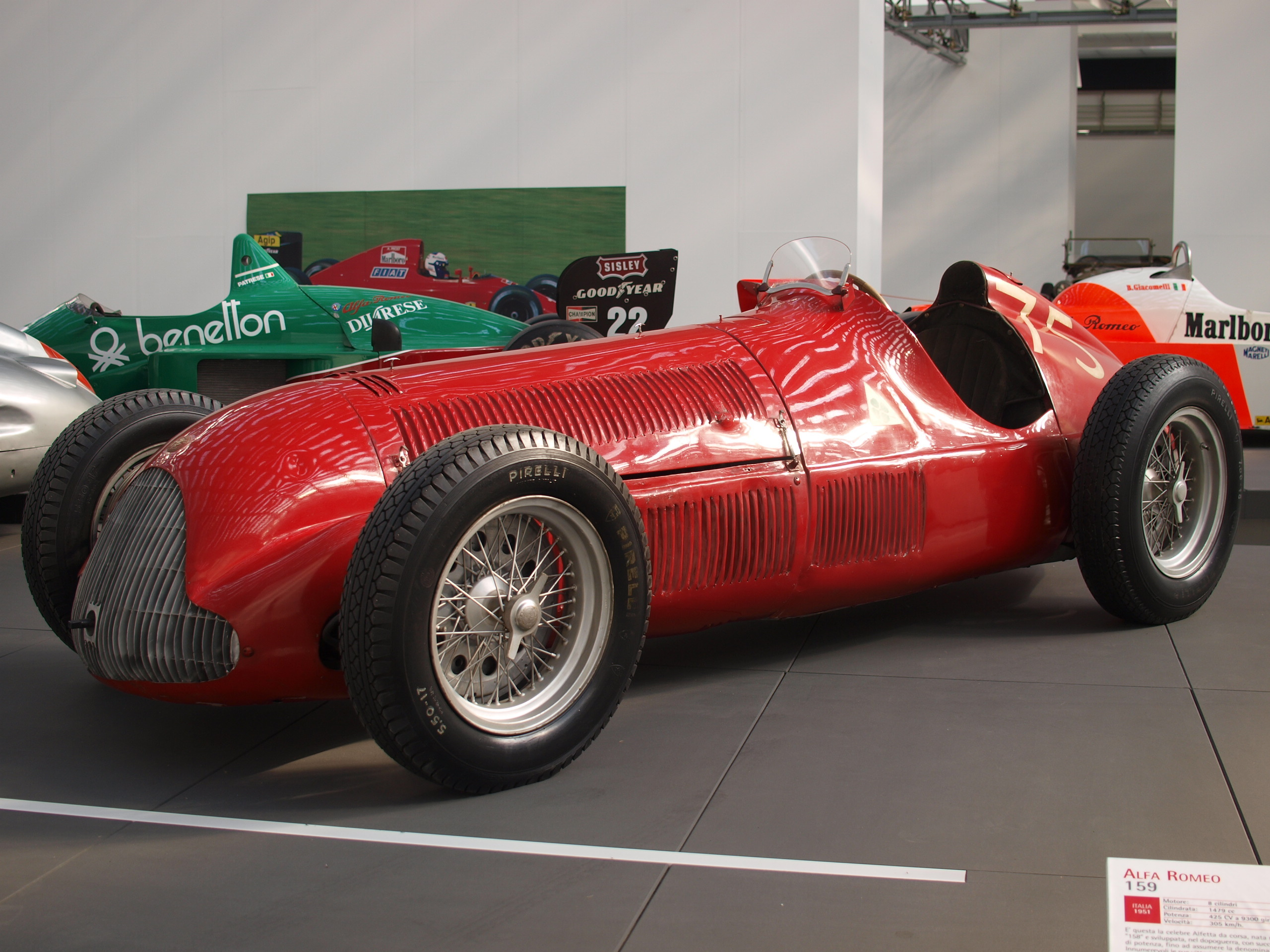 L'evoluzione dell'automobile Alfa Romeo 159